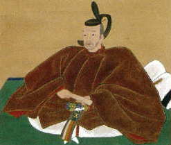 毛利就隆の肖像。